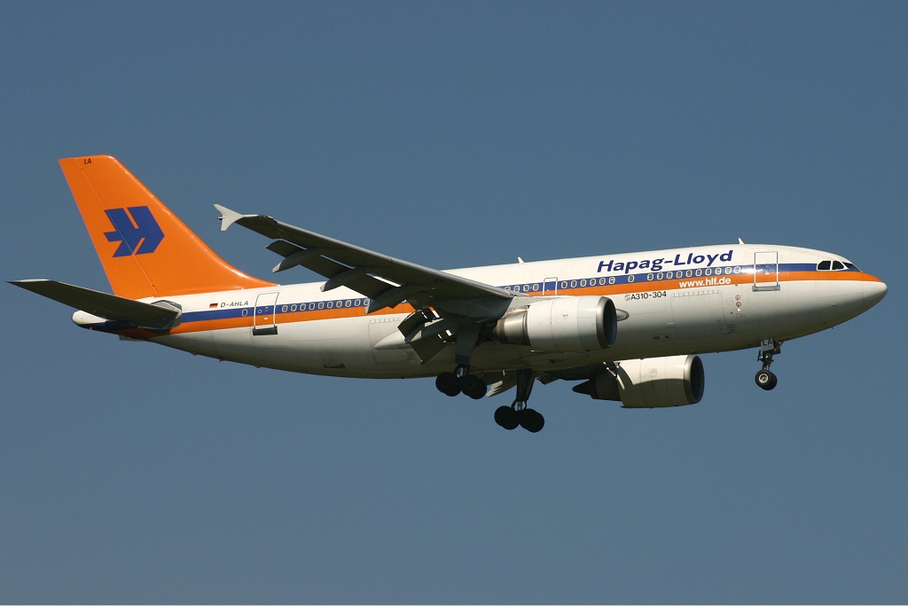 Hapag-Lloyd Airbus A310-325ET